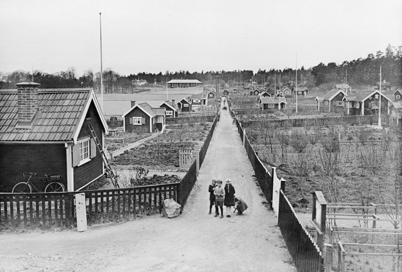 Bergshamra koloniområde, Solna stad.